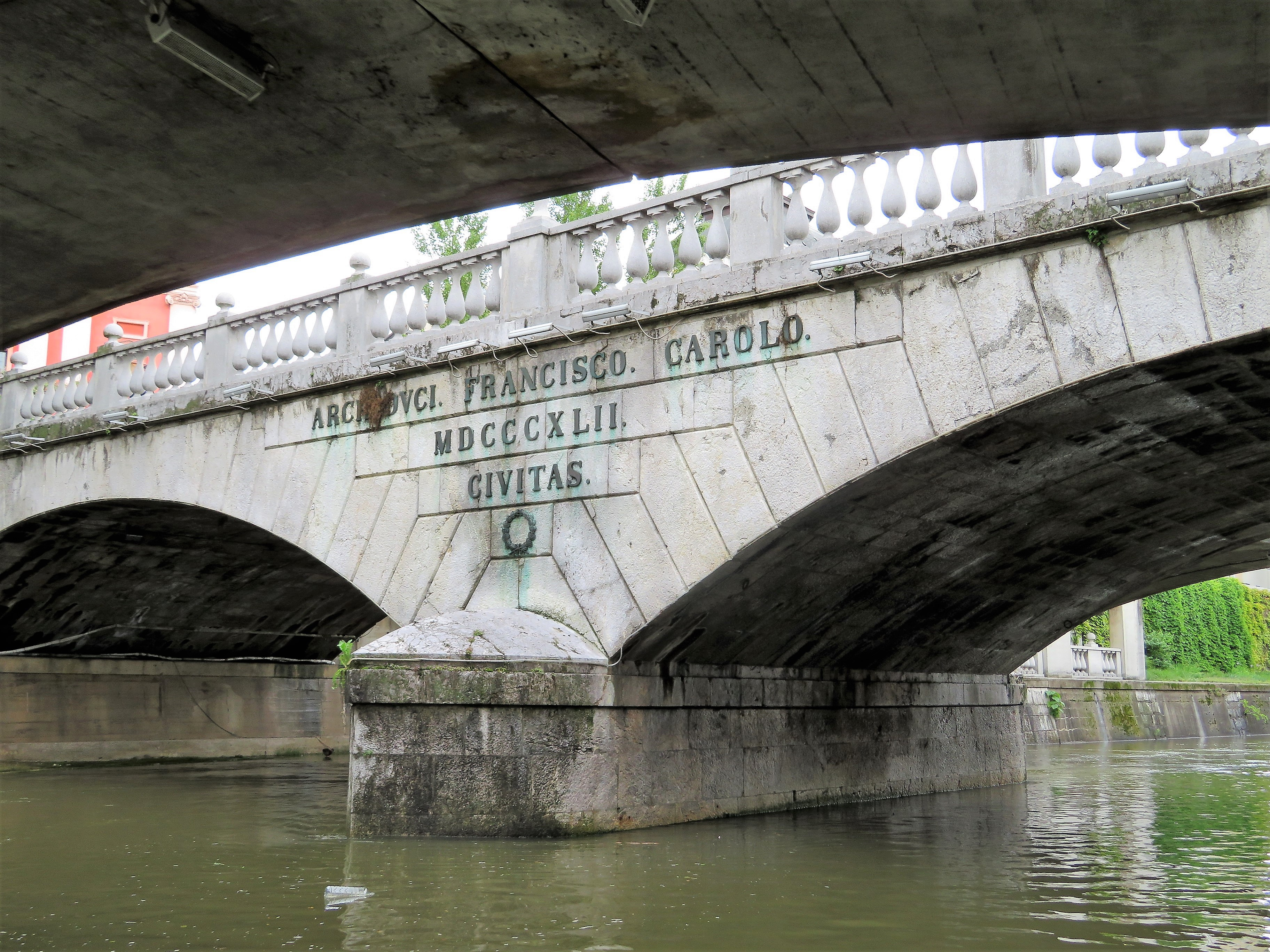 Het centrale deel van de brug Tromostovje over de Ljubljanica in Ljubljana, Slovenië